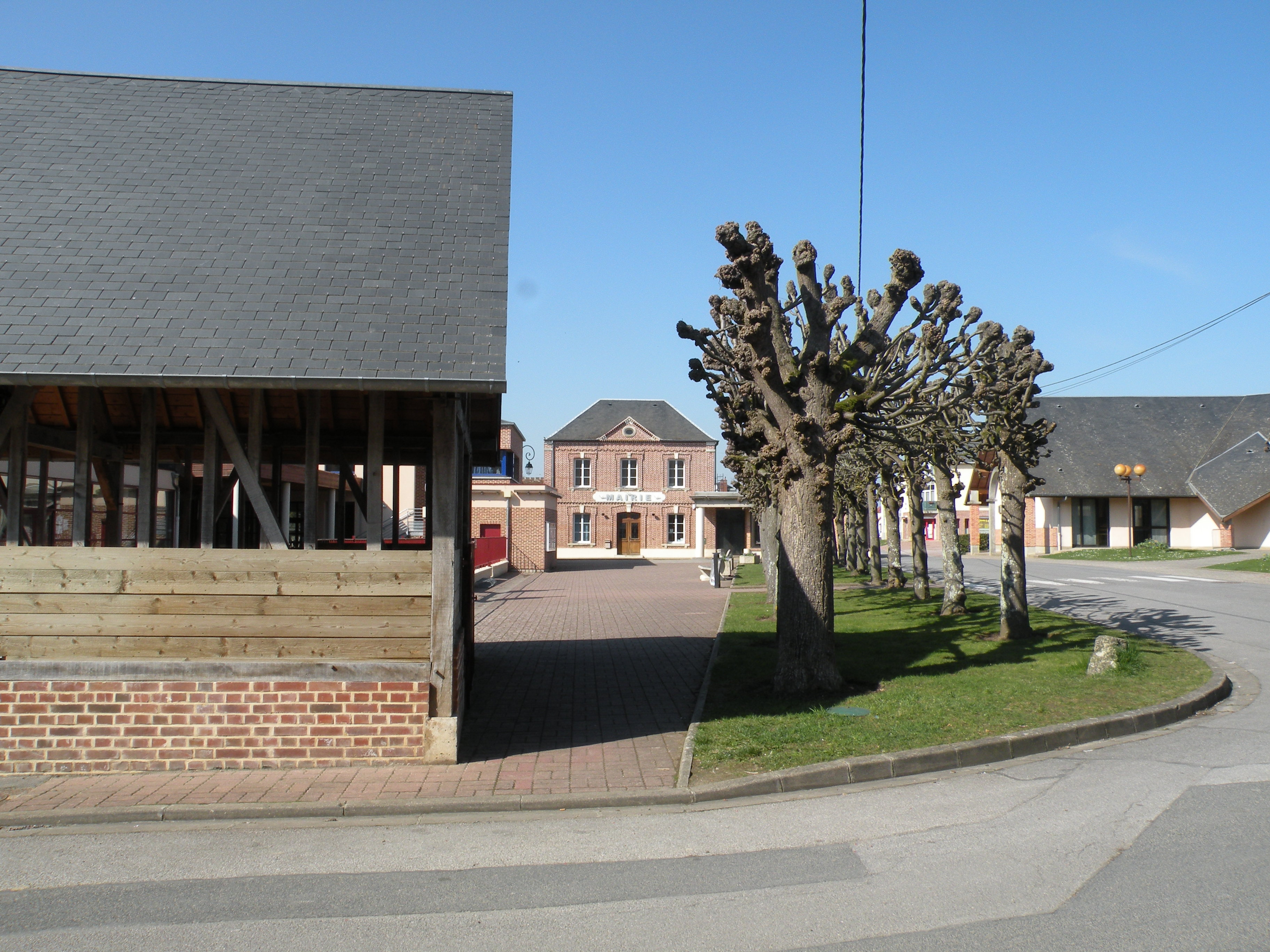 mairie de Rochy-Condé